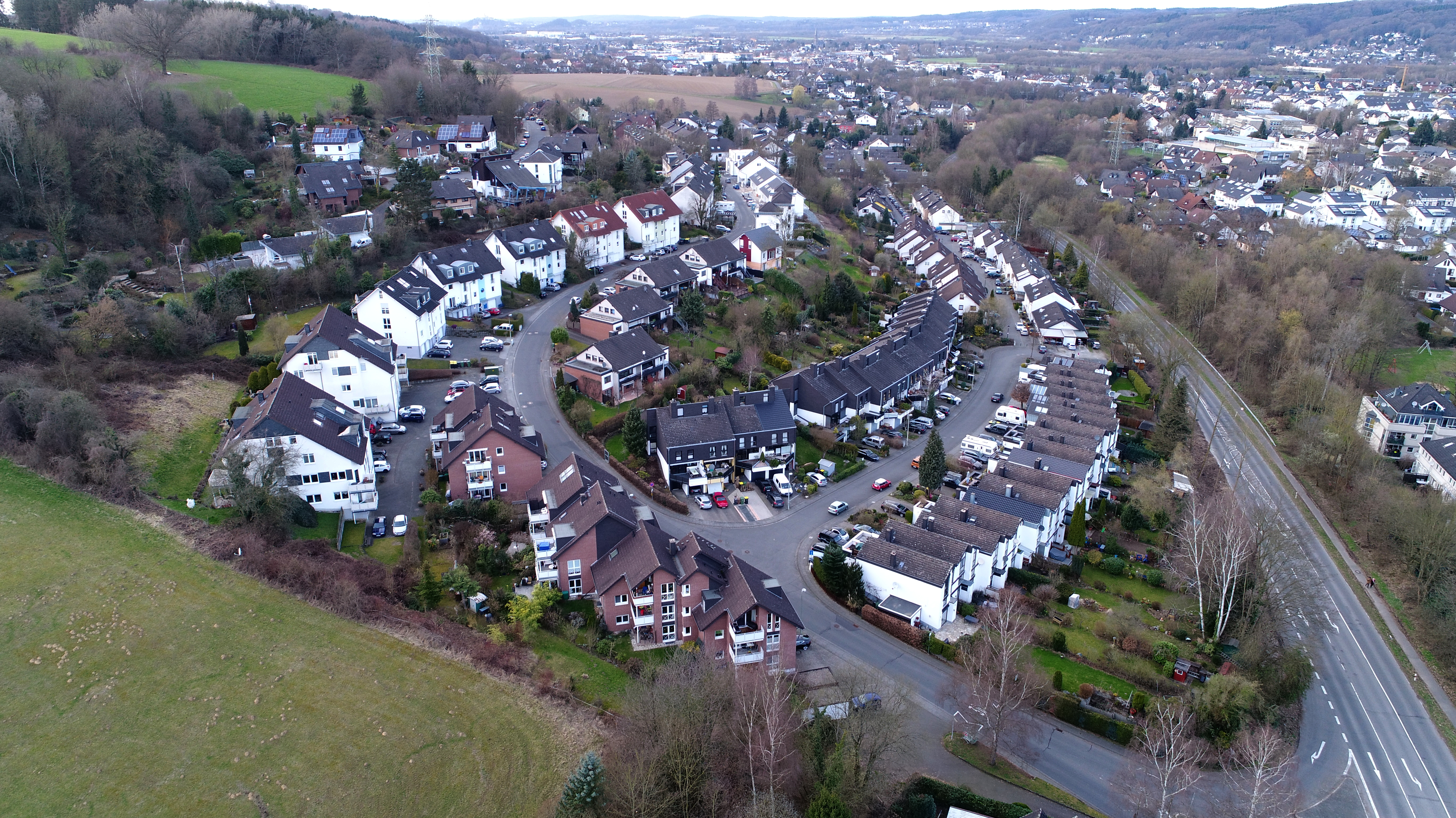 Edgoven, Stadt Hennef (Sieg): südlicher Neubaubereich, Luftaufnahme